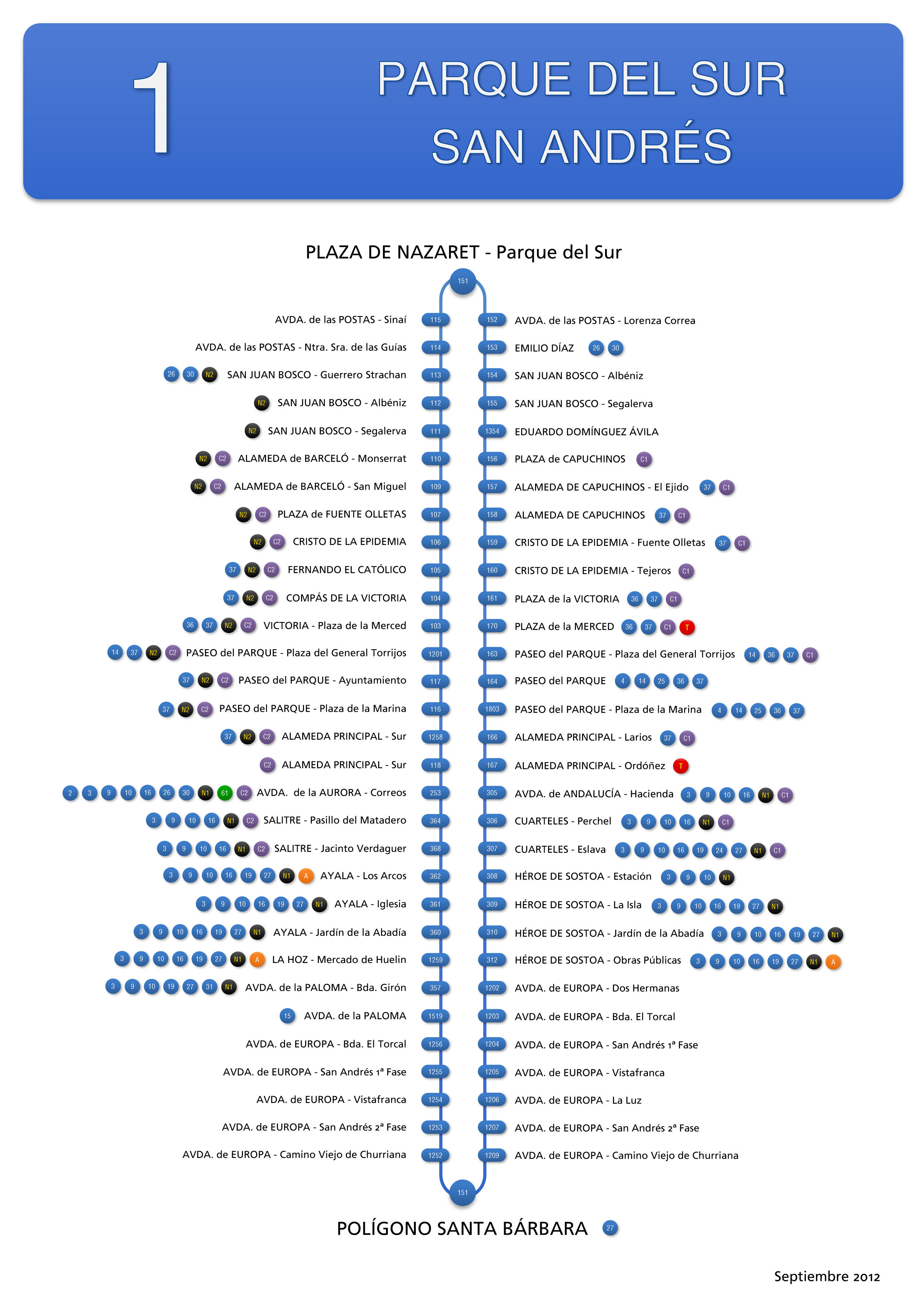 Recorrido de la línea 1 de la EMT de Málaga.